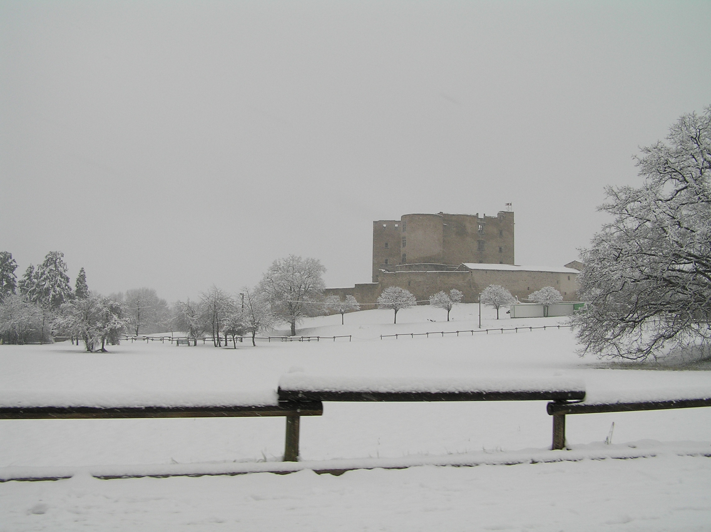 Le château de Montrond les Bains, Loire, France